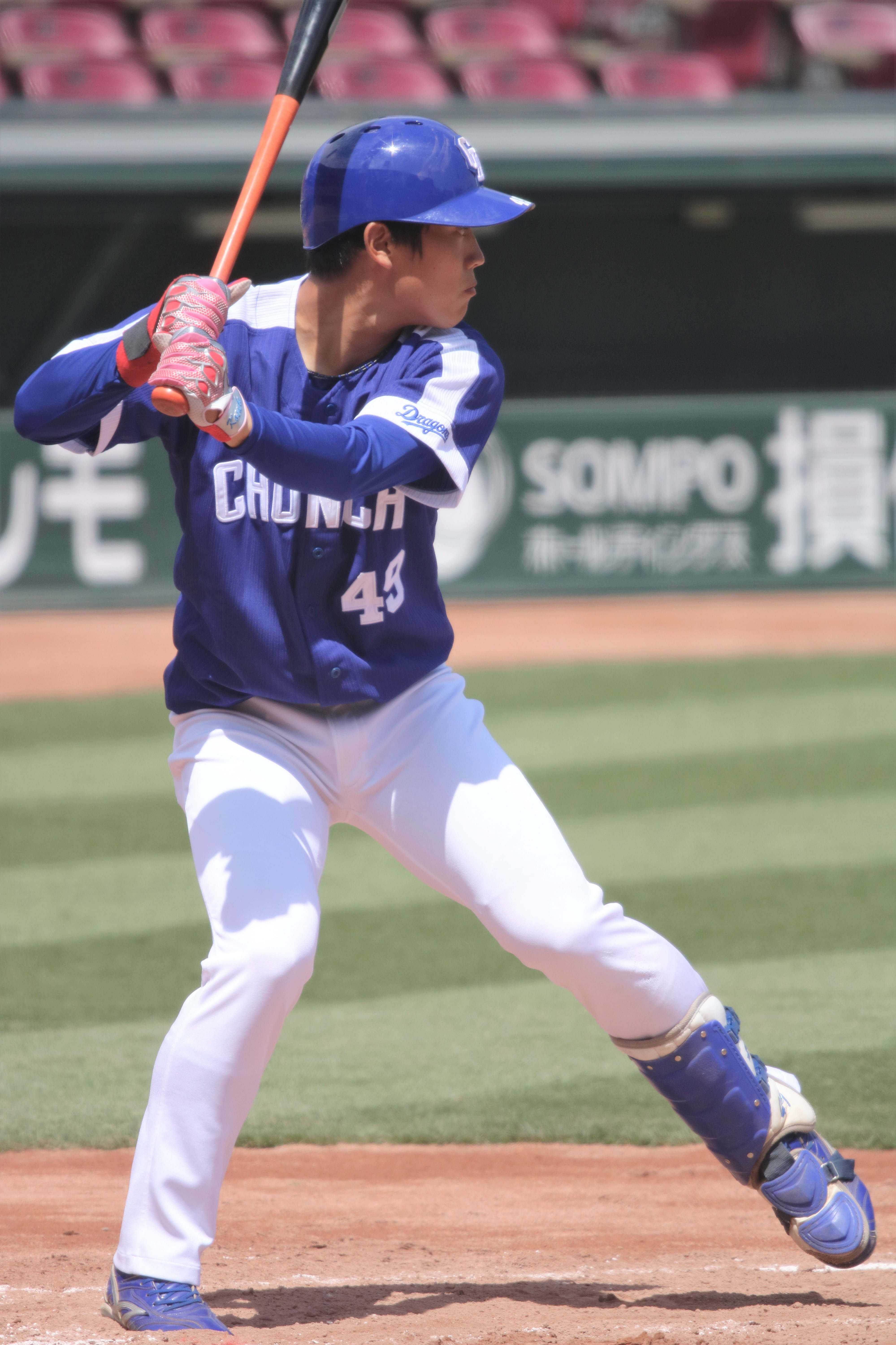 2018/4/13 マツダスタジアム